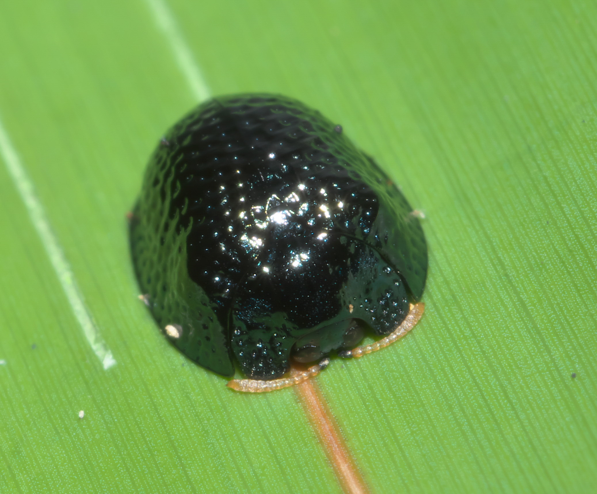 Hemisphaerota cyanea, Palmetto Tortoise Beetle, ID Confidence: 92